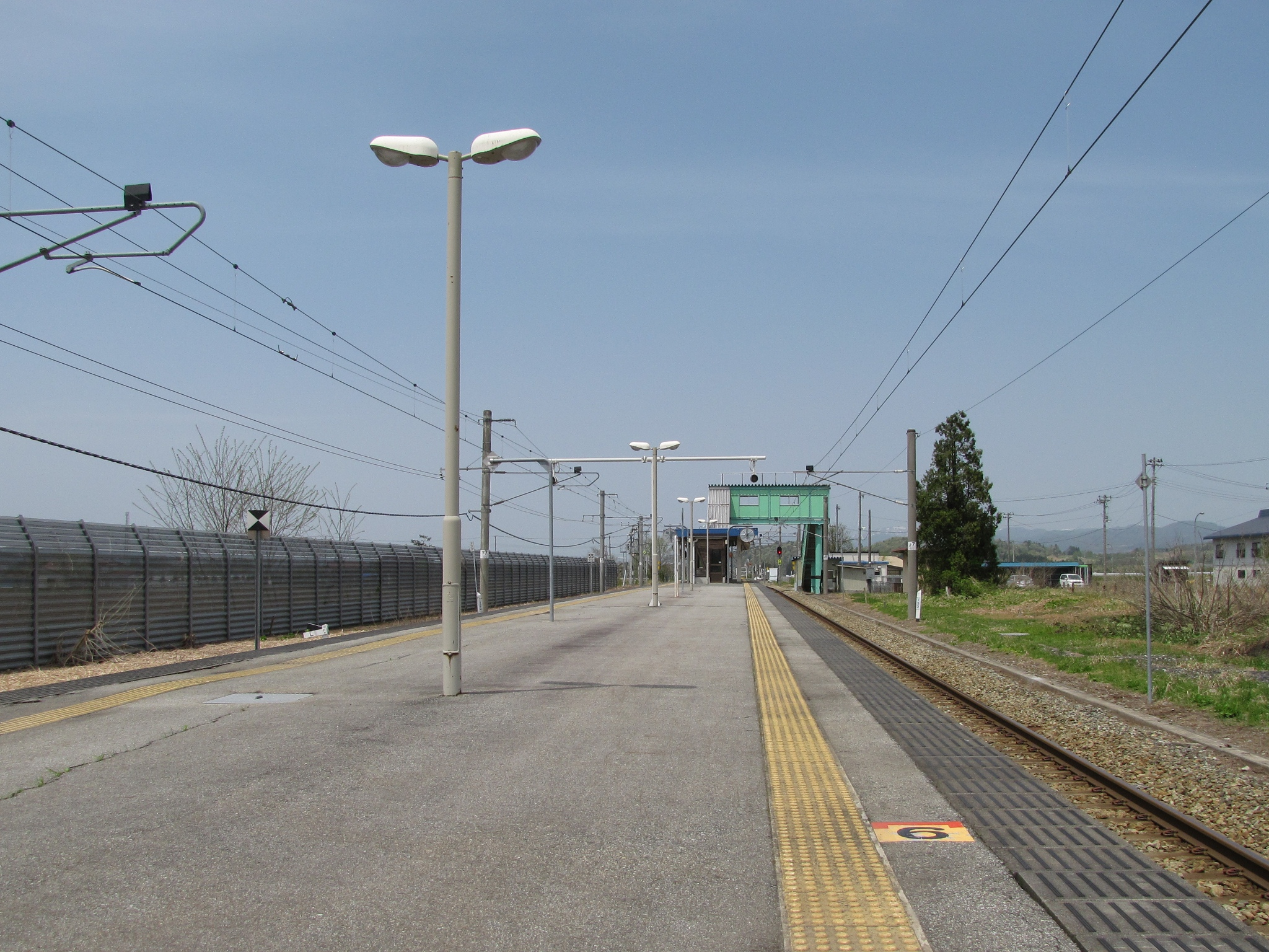 袖崎駅 ホーム